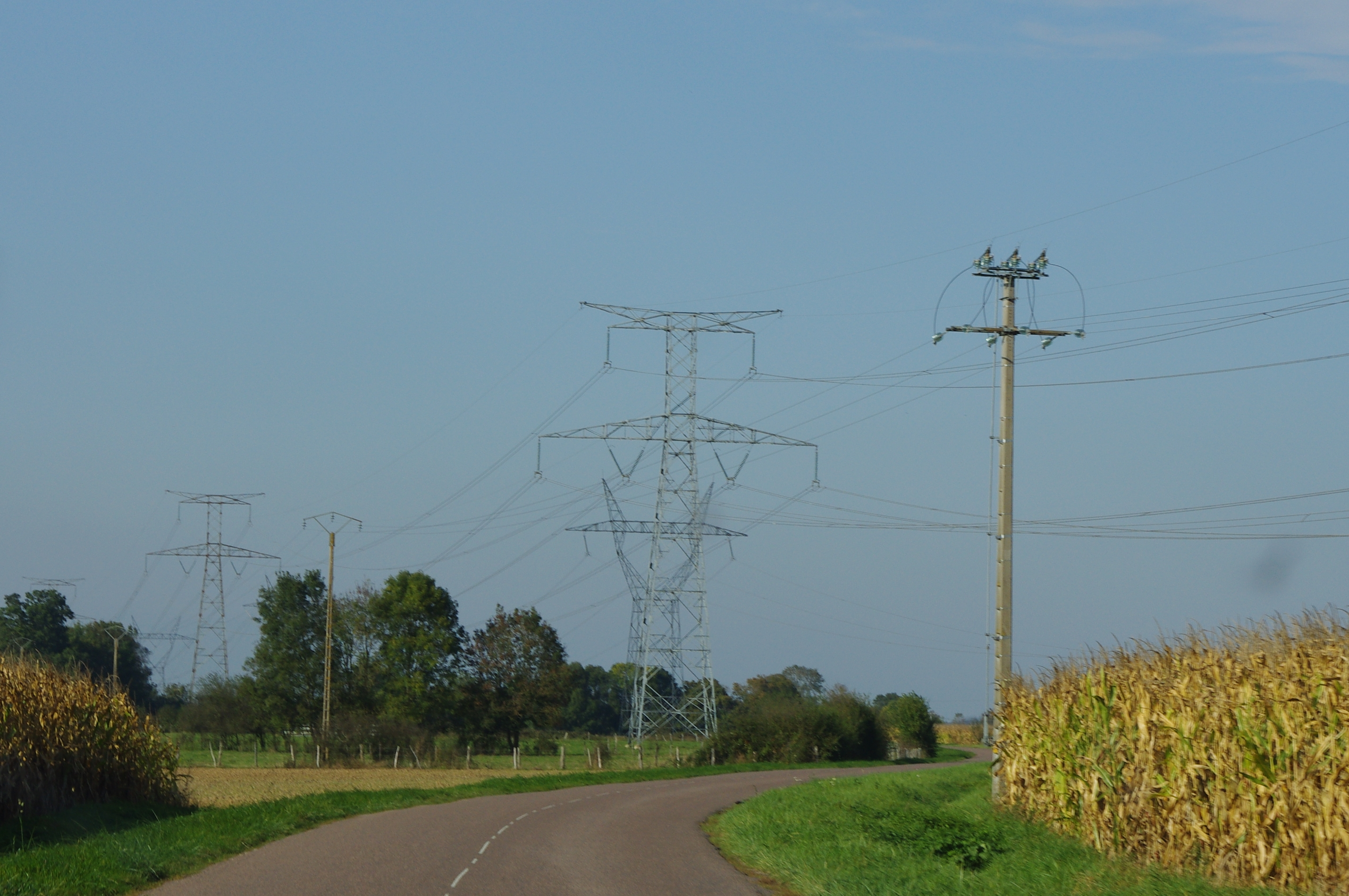 Lignes THT RTE à Corberon (21), FRANCE, Ligne avec pylônes "Chat" datant de 1956 (modernisée en 1960) et ligne avec pylônes "Beaubourg" datant de 1982. Ces lignes partent du barrage de Génissiat (01) jusqu'au poste RTE de Vielmoulin (21.)